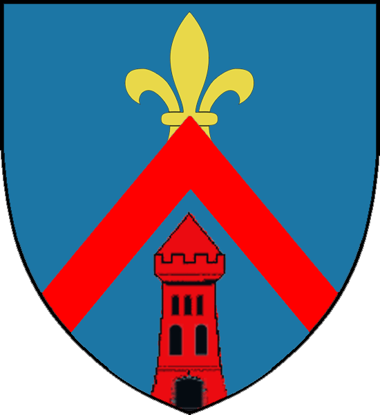 Vapensköld för adelsätten Philp nr 242